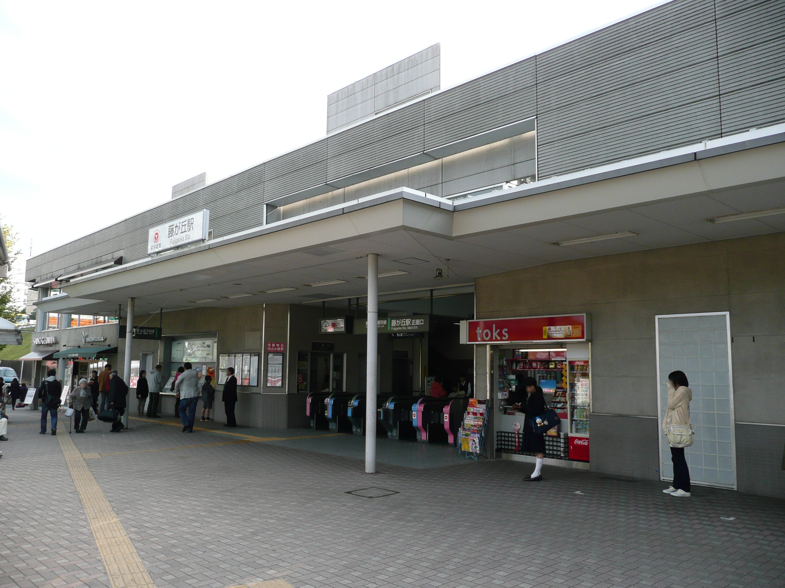 藤が丘駅 (神奈川県)正面口